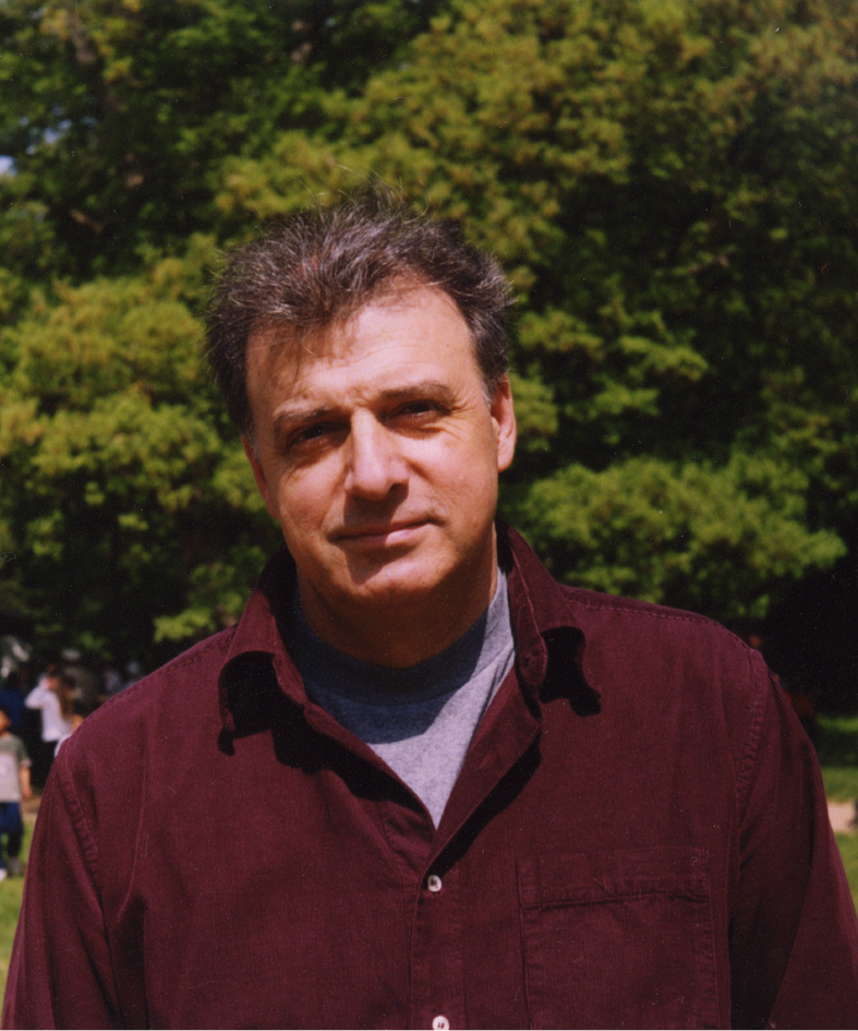 Алдо Климан (роден на 9 ноември 1950 во Битола) - македонски поет, раскажувач, литературен критичар, полемичар, антологичар, преведувач, новинар, издавач и собирач на македонски старини